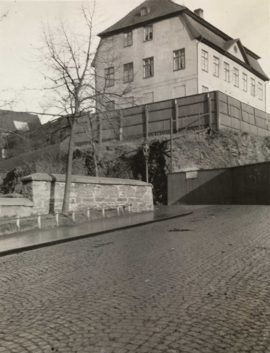 Sorgenfri løkke hovedbygning, bergknaus, plankegjerde, gatelegeme, brostein. Foto N. Engstrøm/Oslo Museum, ca. 1910-20.